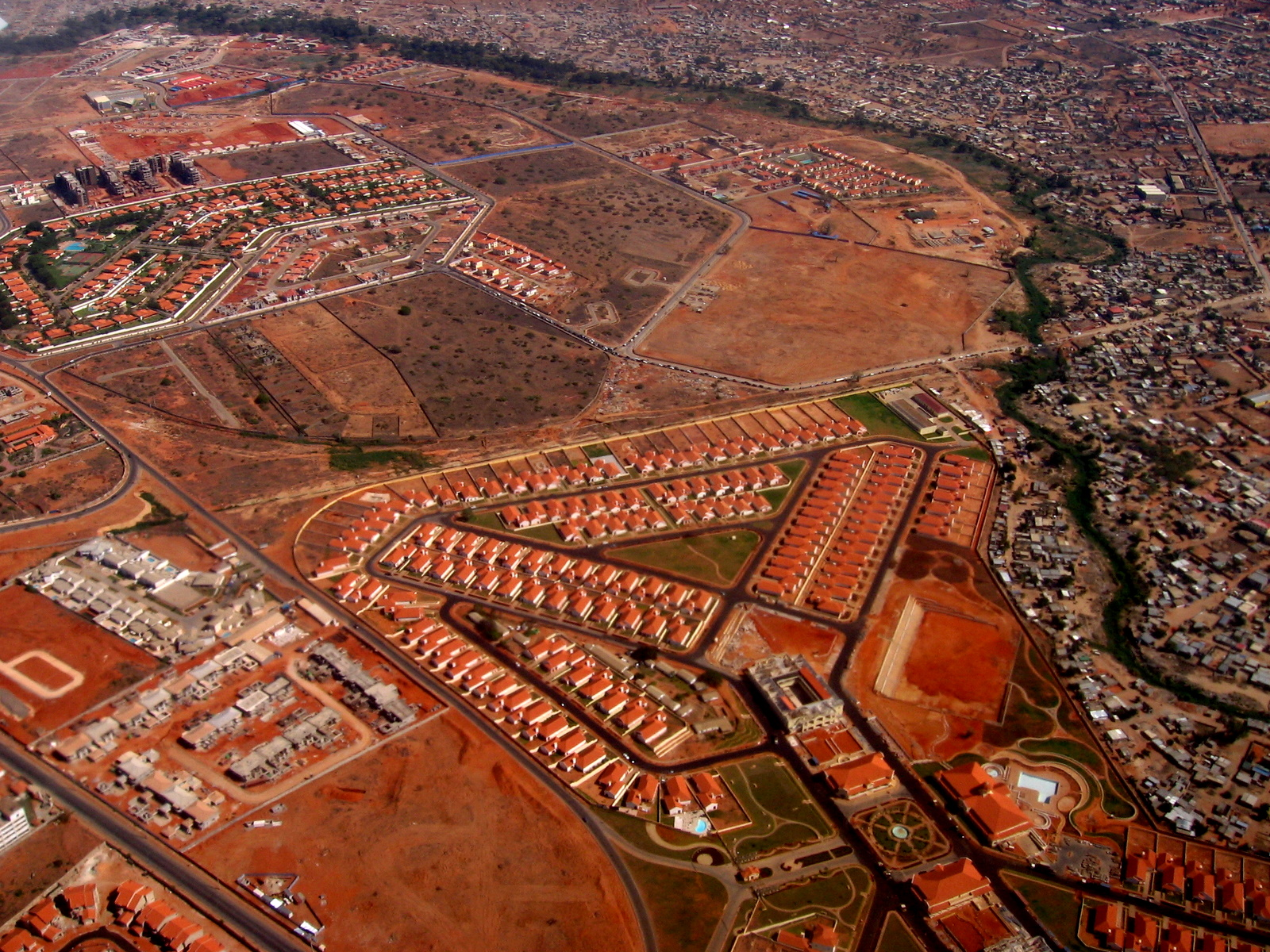 New housing area Luanda Sul, Luanda, Angola, 2009